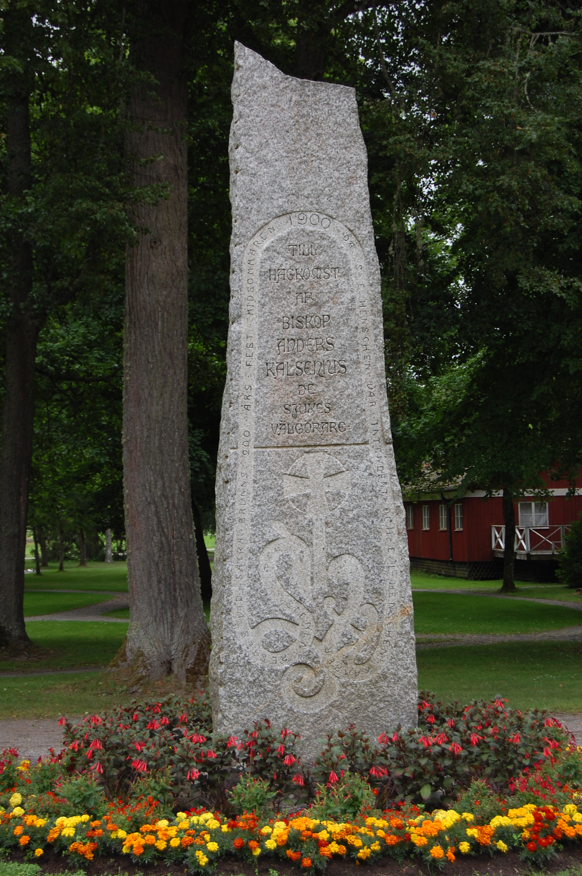 Kalseniusstenen på Sätra brunn sett framifrån